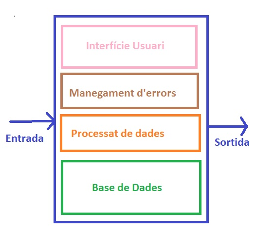 soft